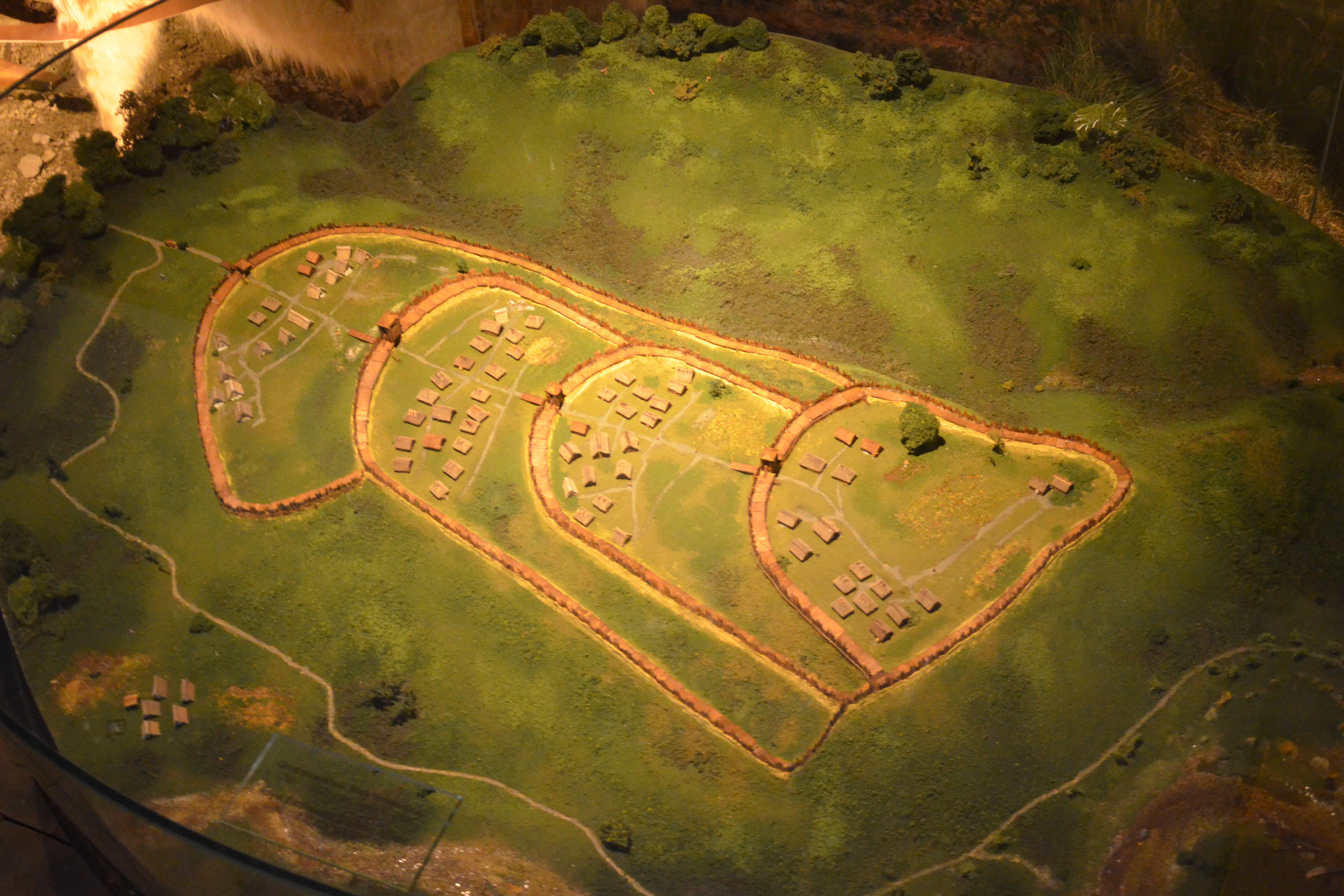 Der Otomani-Füzesabony-Kultur - Hügelgräberkultur in Beskiden - Die Vorland-Gebiete Trzcinica bei Jasło